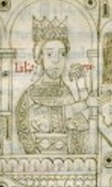 Lambert de Spolète.